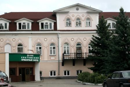 р.п. Елатьма, вид парадного входа Елатомского приборного завода